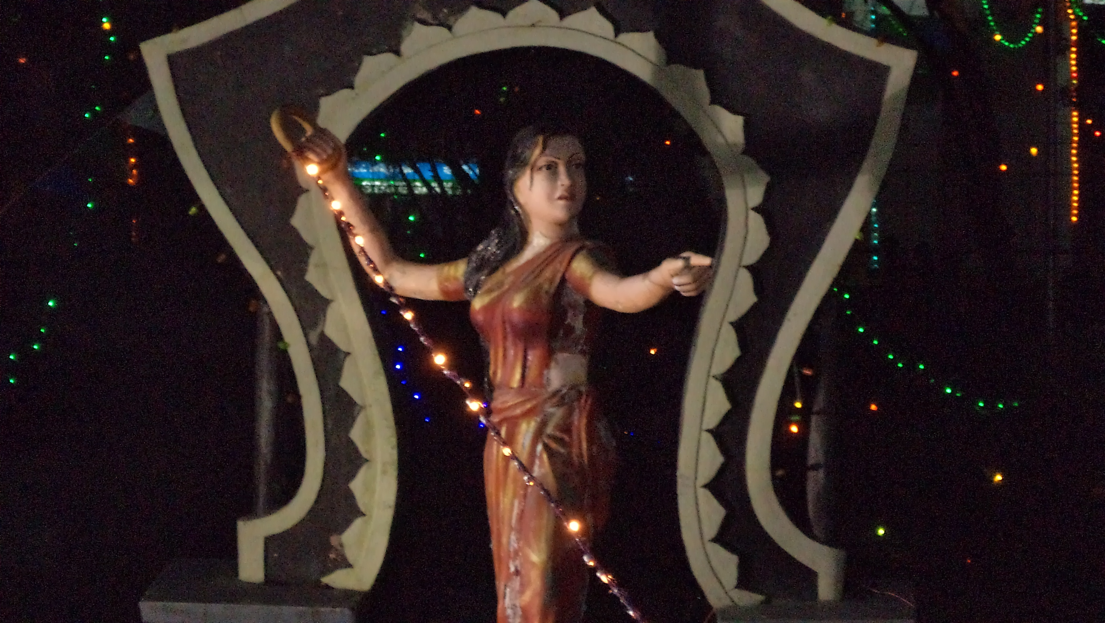 சிலம்புடன் காட்சியளிக்கும் கண்ணகி சிலை